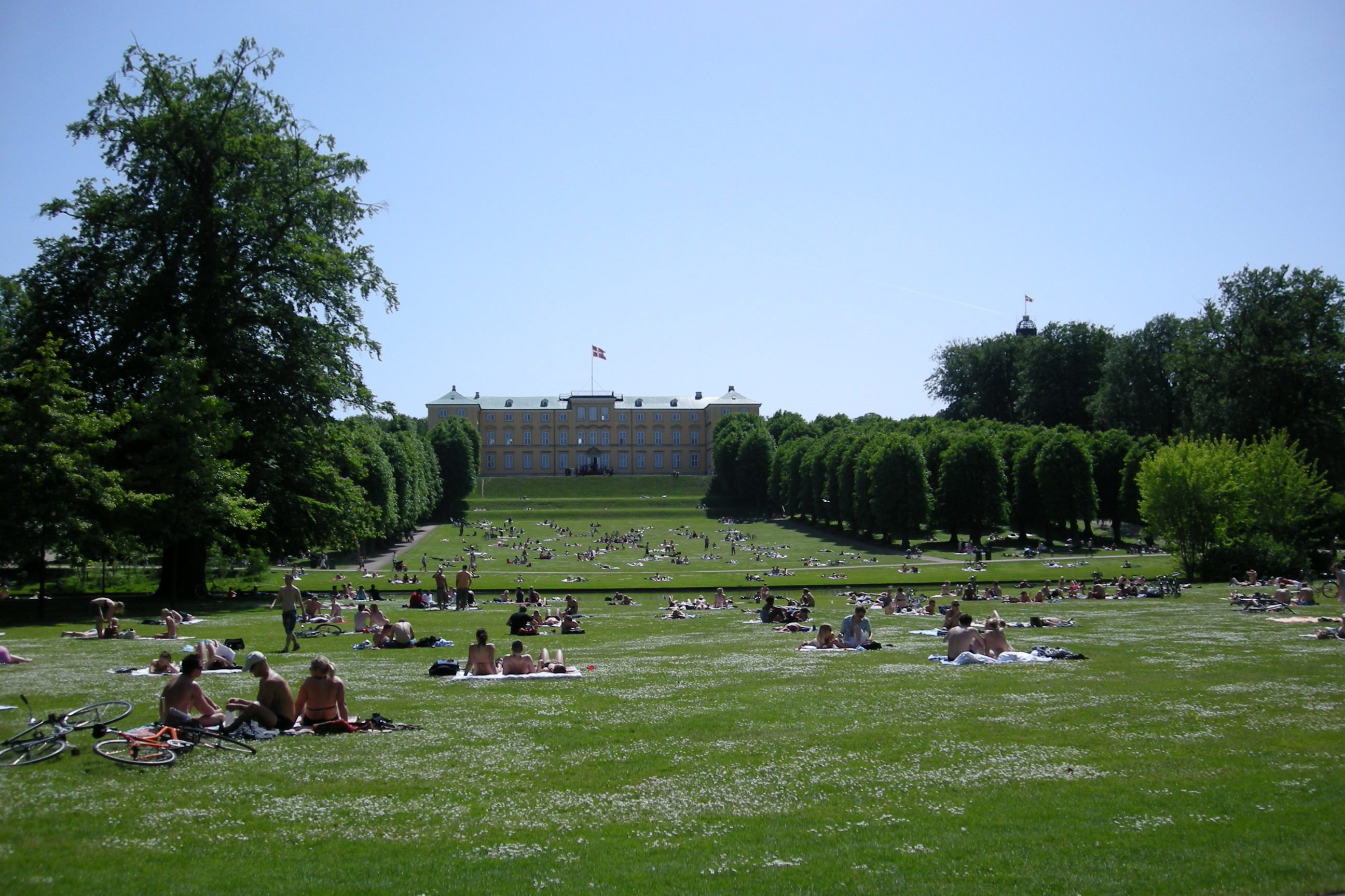 Frederiksberg Park with Frederiksberg Palace in the Frederiksberg district of Copenhagen, Denmark